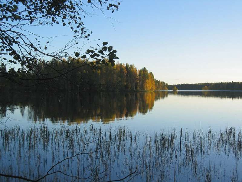 Lake Sirkjärvi, Finland